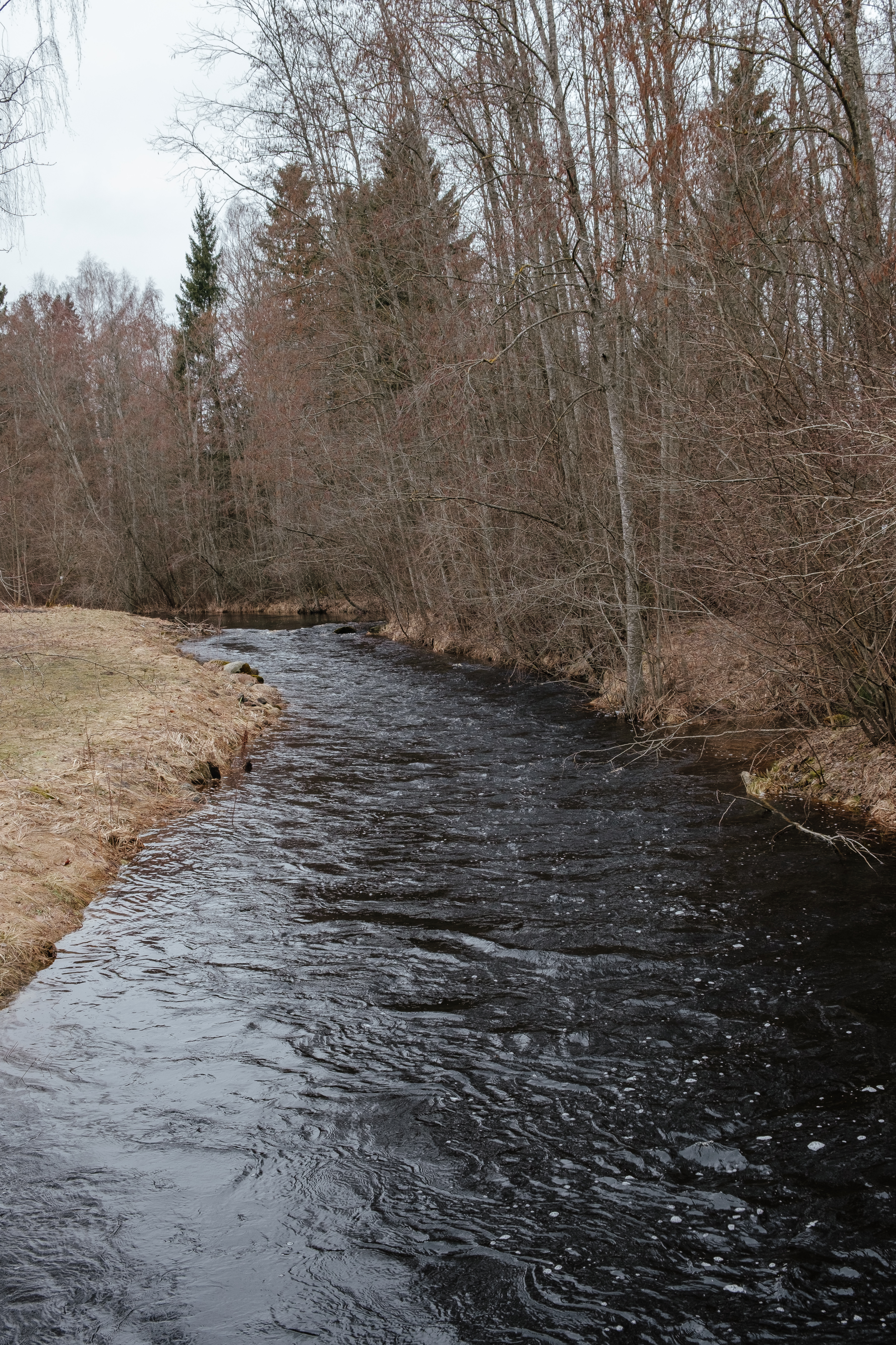 Upe Vidzemē. Attēlā agrā pavasarī pie Akenstakas dzirnavām